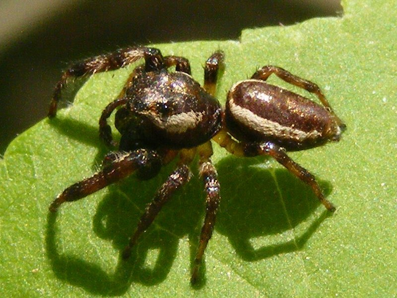 Pelegrina exigua : Photographié dans la région montréalaise le 6 juin 2011, sur Fujifilm FinePix S700.